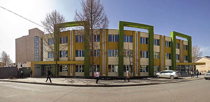 Монгол: Байр3